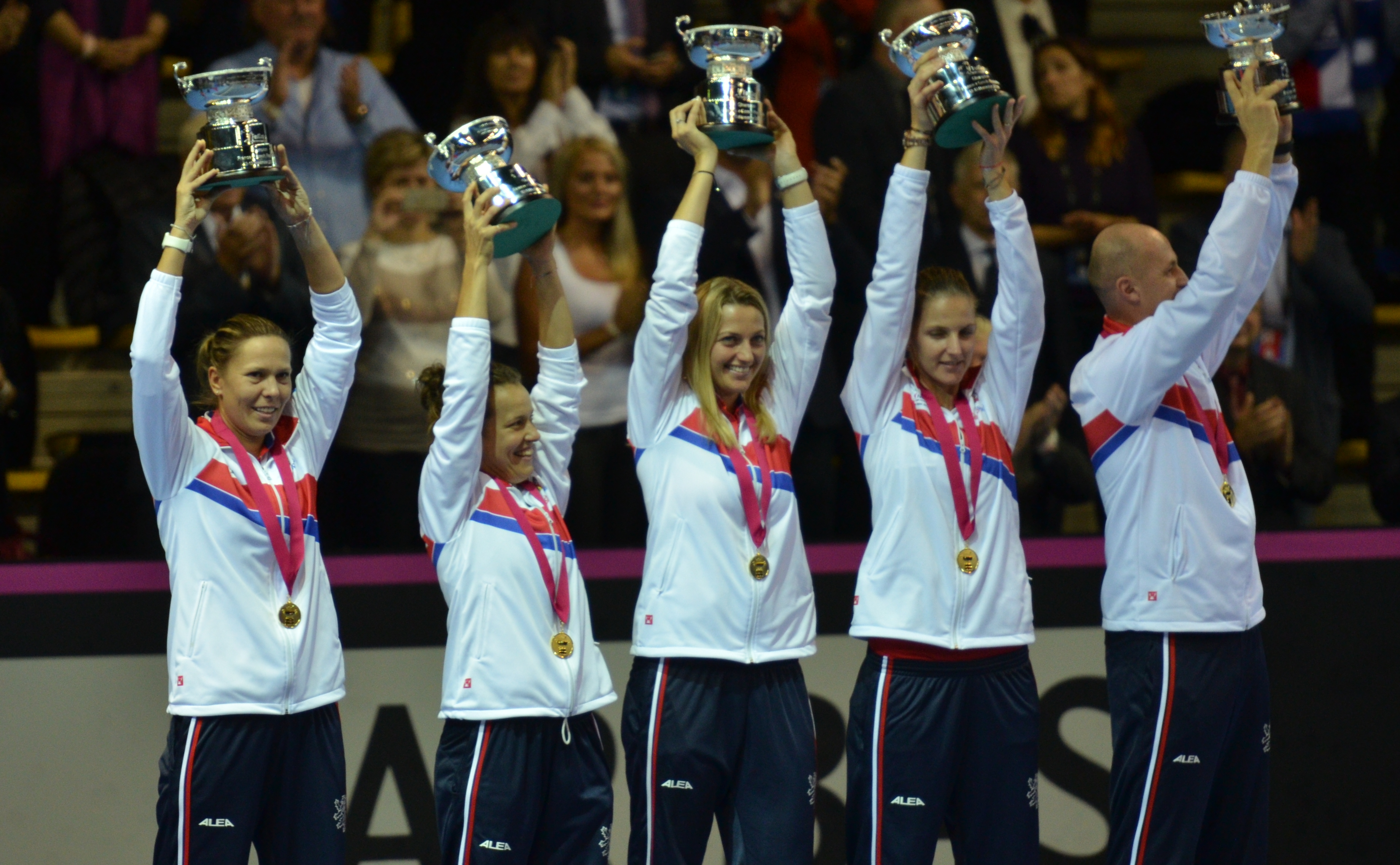 PPP_3485